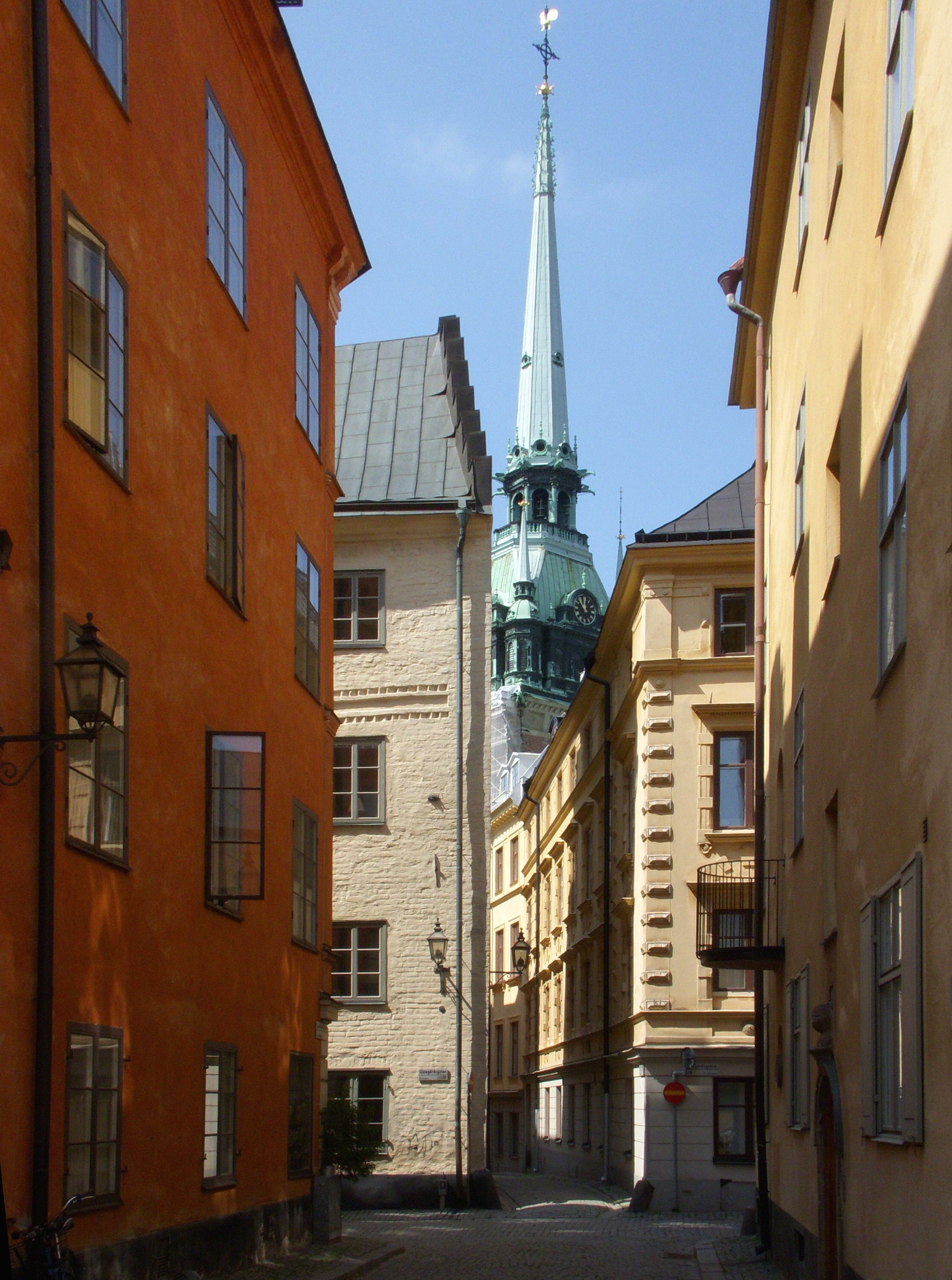 Tyska kyrkan, Stockholm, sedd genom Tyska skolgränd